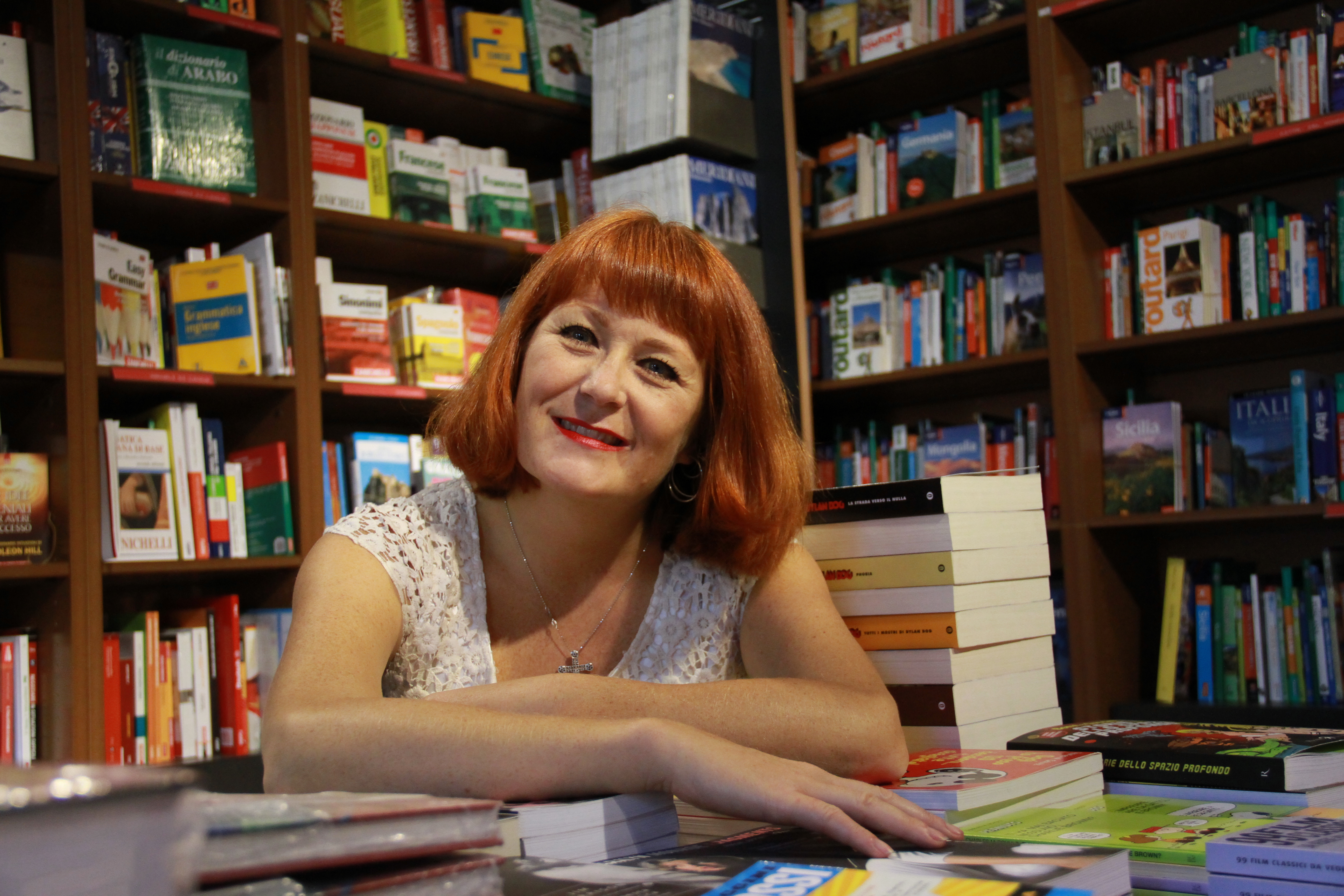 FT Liisa Väisänen